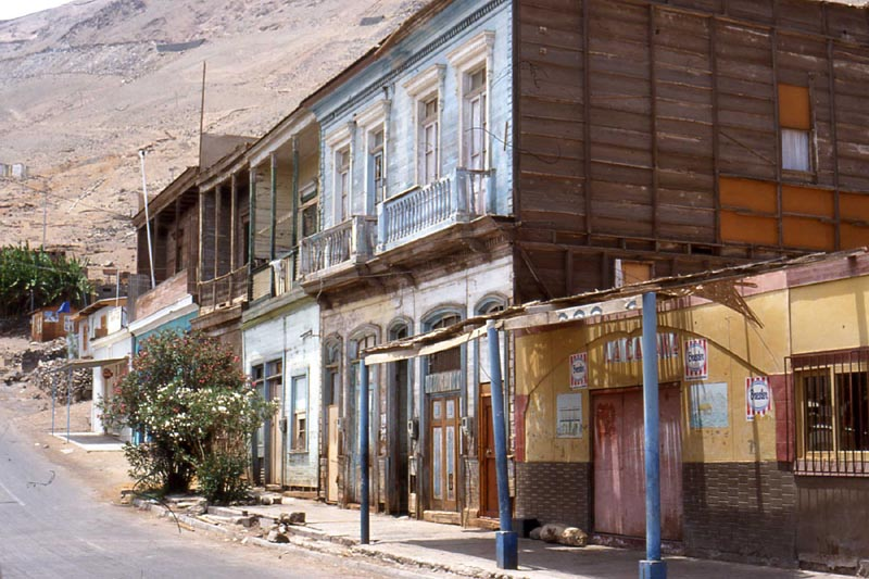 Pisagua